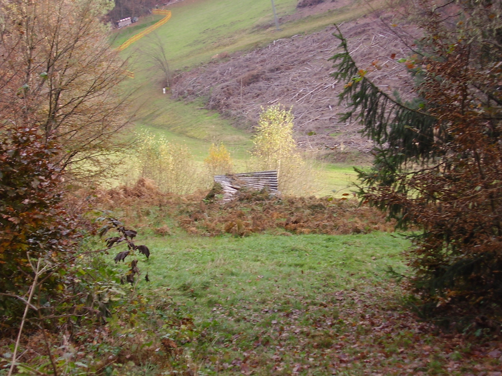 ehemaliger Anlauf und Schanzentisch der Adalbert Clausius Sprungschanze